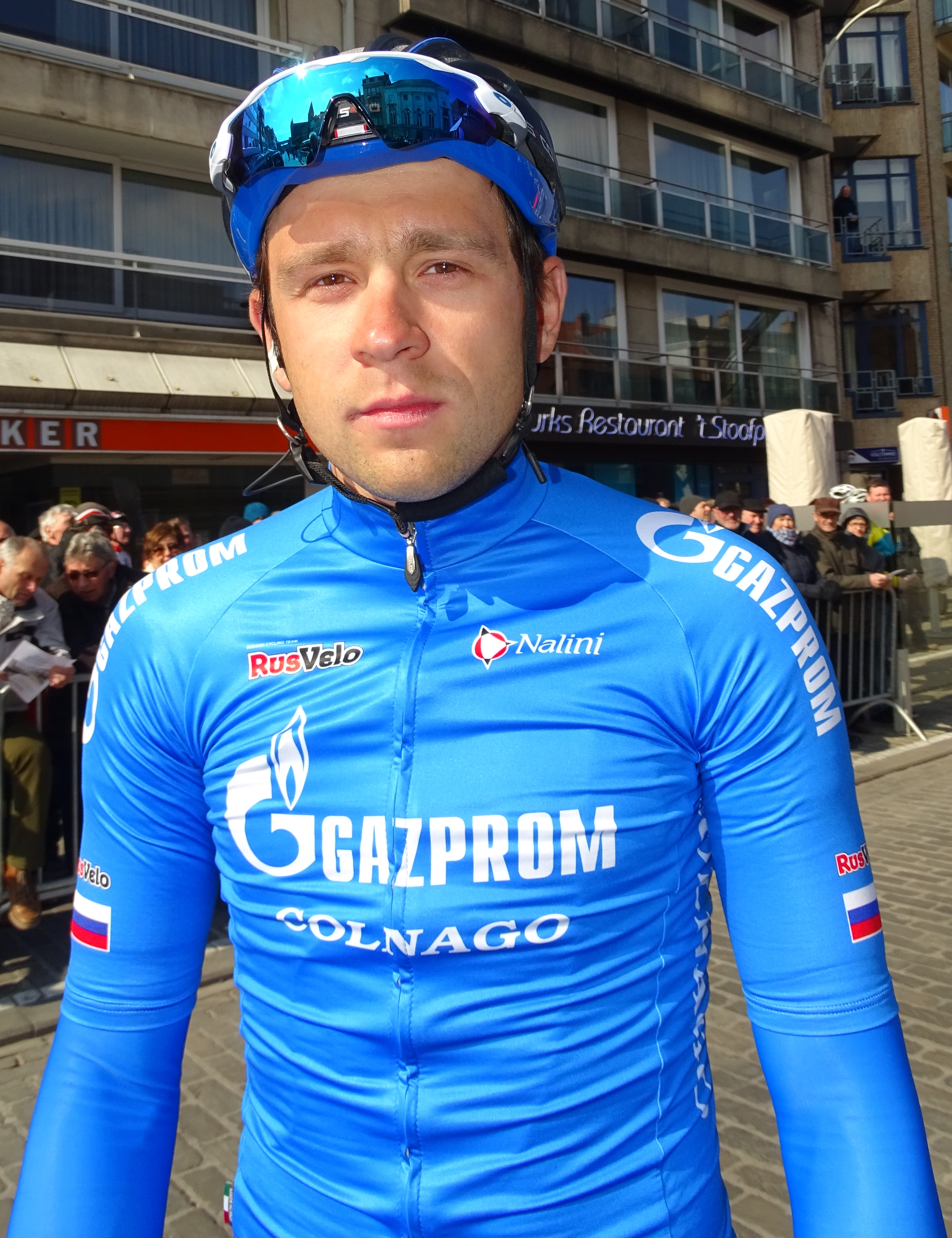 Reportage réalisé le mercredi 16 mars à l'occasion du départ de la Nokere Koerse 2016 à Deinze, Belgique.